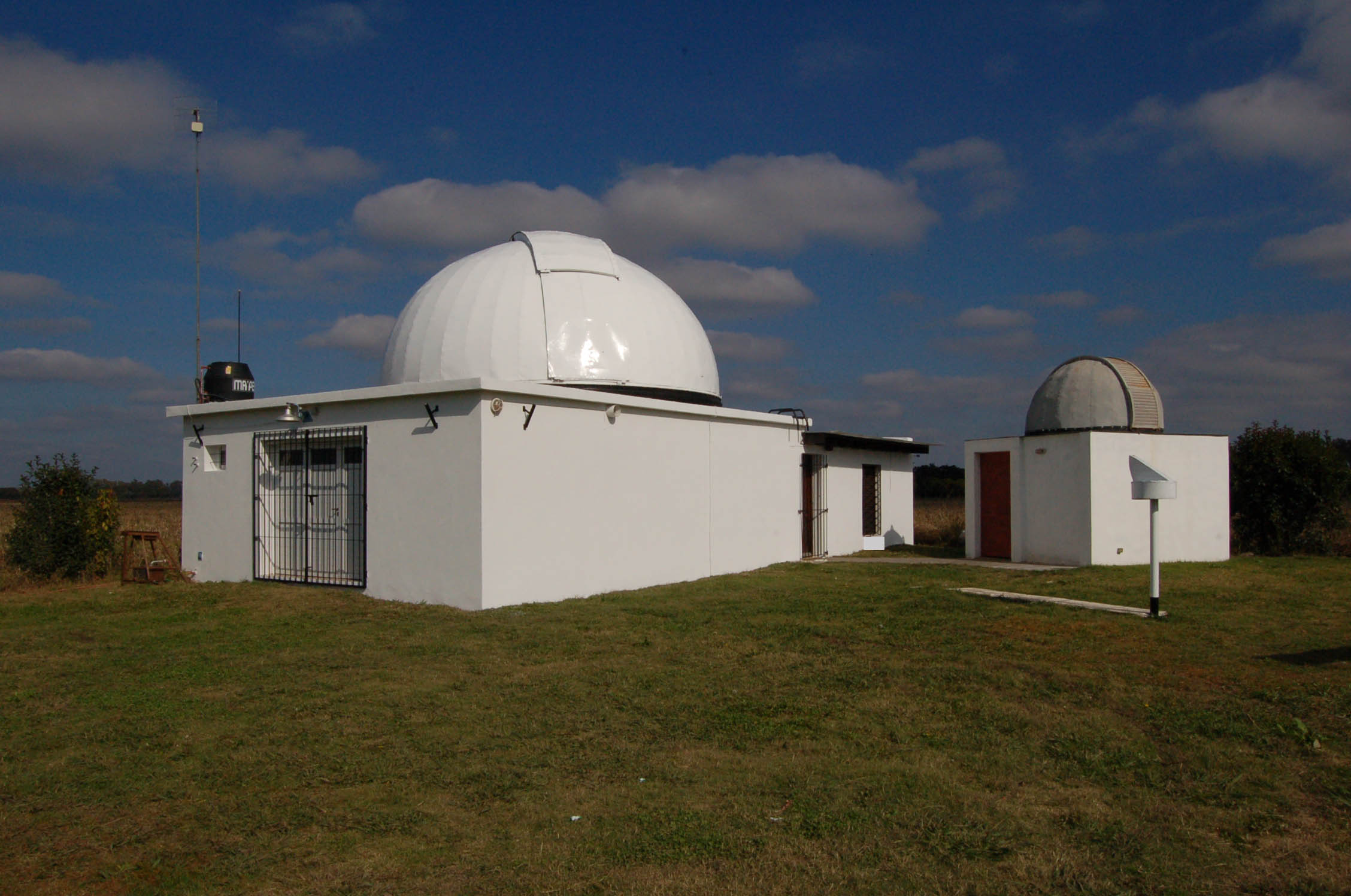 Cupulas de telescopios de 0,6 y 0,3 metros de diametro